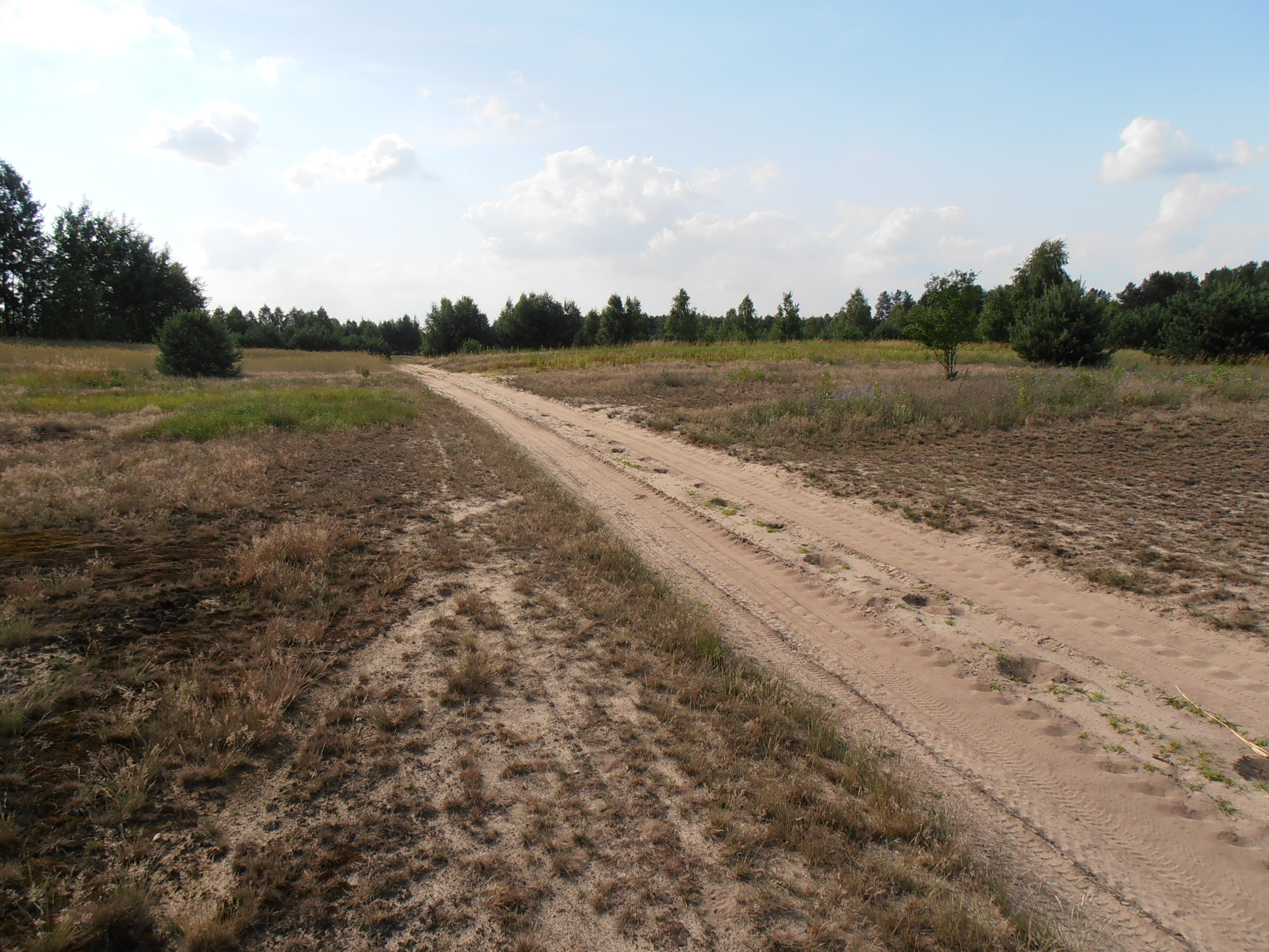 Gmina Krzywda – krajobraz z okolic wsi Drożdżak.